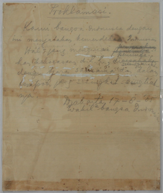 Naskah proklamasi asli tulisan tangan Soekarno yang disimpan di gedung Arsip Nasional Republik Indonesia